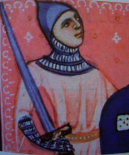 Pierre de Portugal (1187-1256) Enluminure du Livre des Rois (Llibre dels Reis) de 1334, codex 1, folio 338, conservé aux Archives du Royaume de Majorque (Arxiu del Regne de Mallorca)